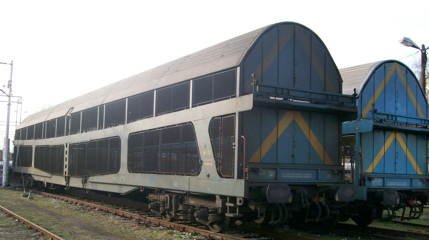 Vagon za prijevoz automobila - zatvoreni Hrvatskih željeznica (Slovna serija MDDLm)